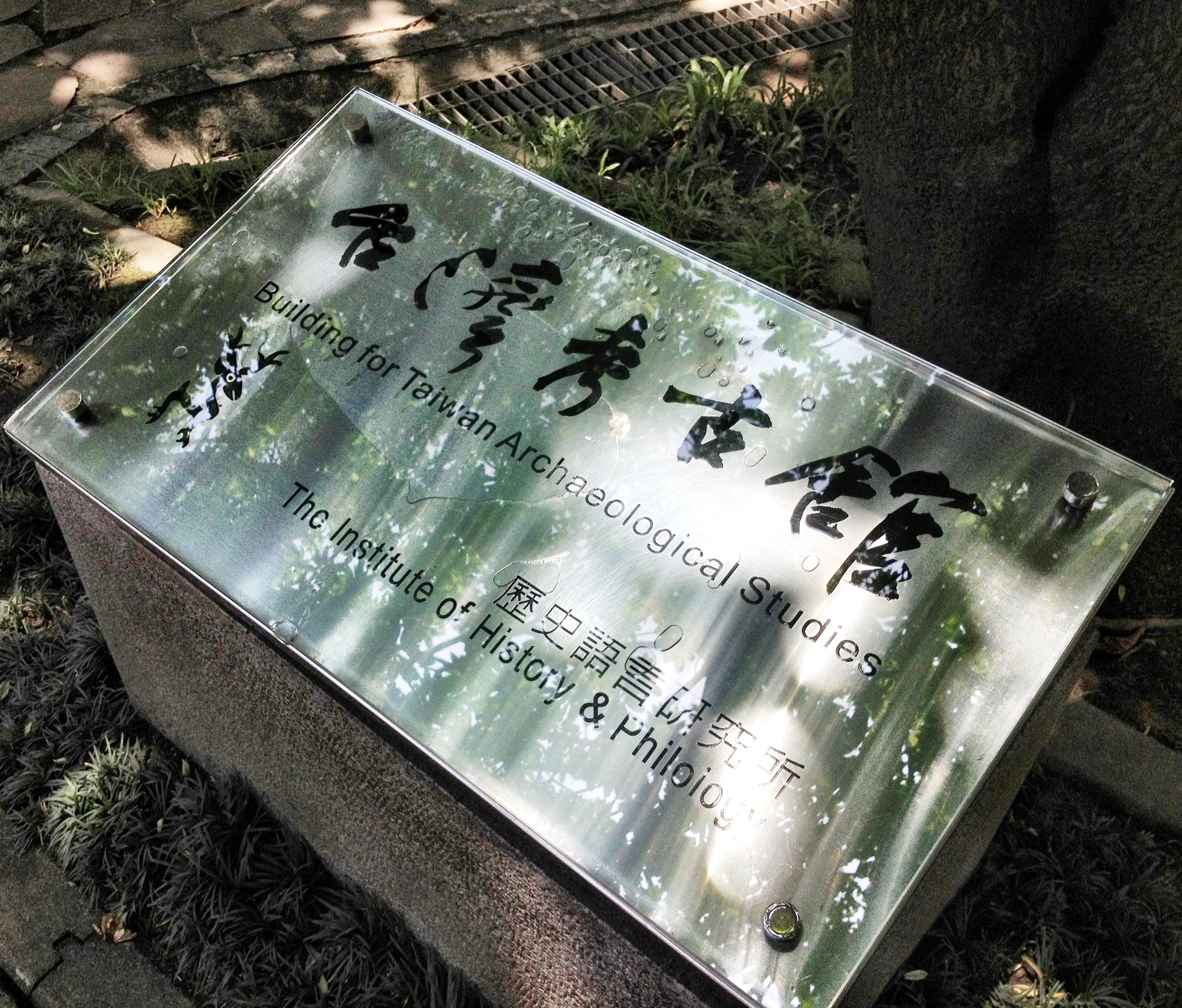 中央研究院歷史語言研究所台灣考古館銘板。